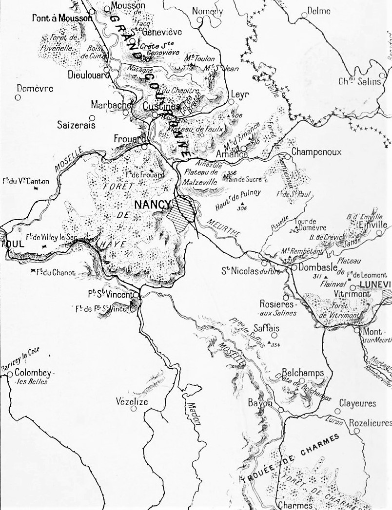 Nancy et le Grand Couronné